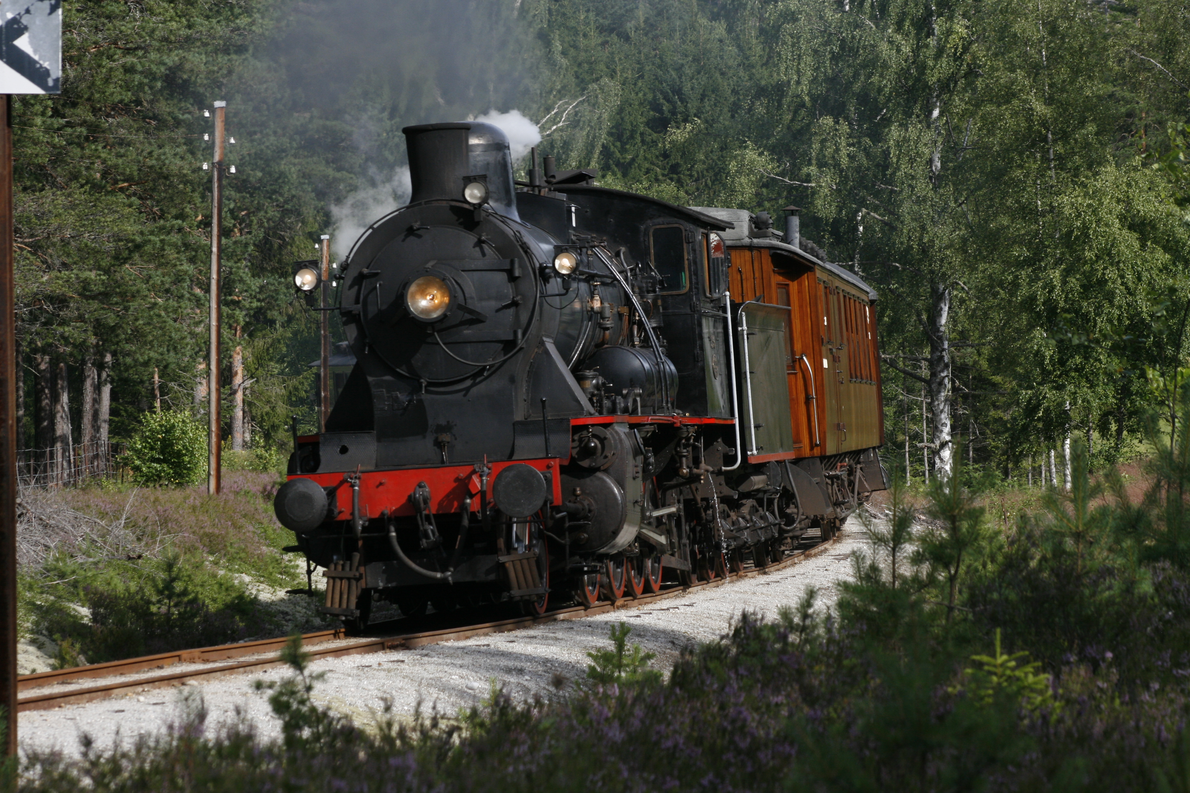 Damplokomotiv type 24b nr. 236 ved Snarum 2012